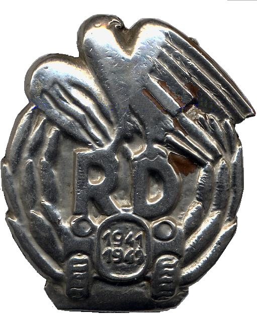 Slowakische Schnelle Division 1941-1942. Odznak príslušníkov rýchlej divízie, ktorej veliteľstvo sídlilo v Prešove.